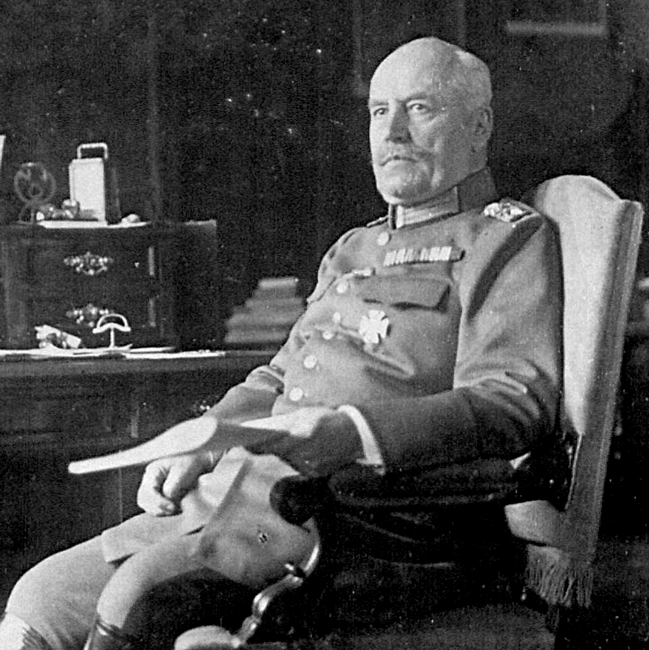 Seine Exz. der württembergische Kriegsminister von Marchthaler begeht dieser Tage das Jubiläum seiner zehnjährigen Amtstätigkeit